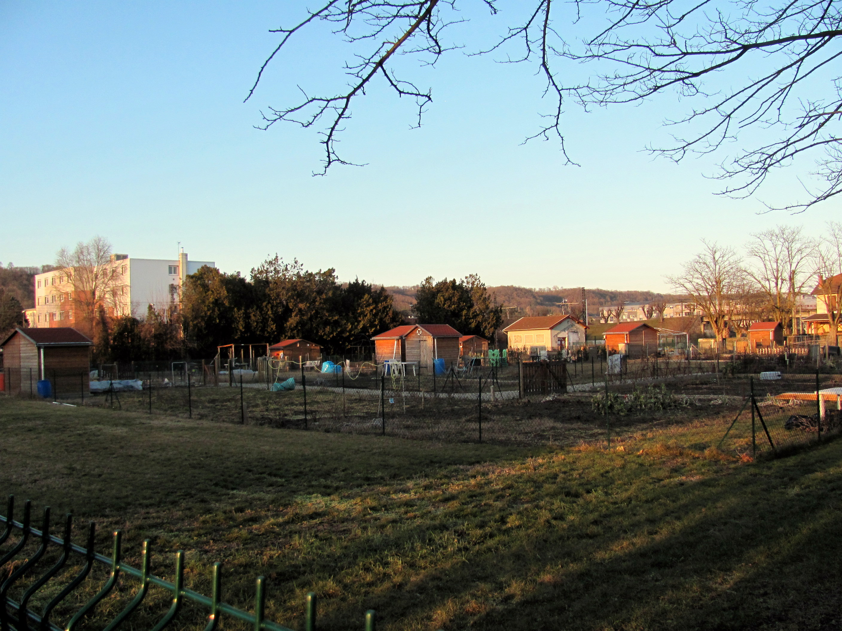 Jardins ouvriers à Saint-Maurice-de-Beynost, implantés sur l'emplacement de l'ancien terrain du club de football Olympique Saint-Maurice aujourd'hui disparu (fusionné en Ain Sud Foot, en 1999).